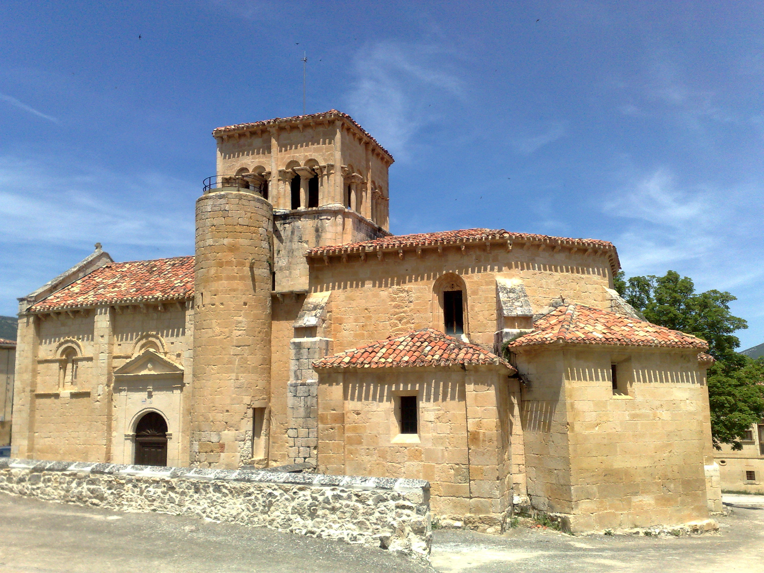 Iglesia parroquial del Almiñé de Valdivielso, similar a la de San Pedro de Tejada del mismo valle. Los restos románicos se reducen a la nave y la torre. Vista desde el sur.